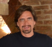 Valerio Staffelli